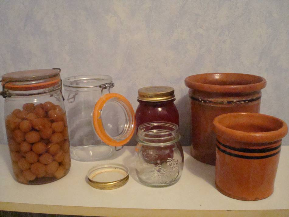 Photo verschiedener Konservengläser.